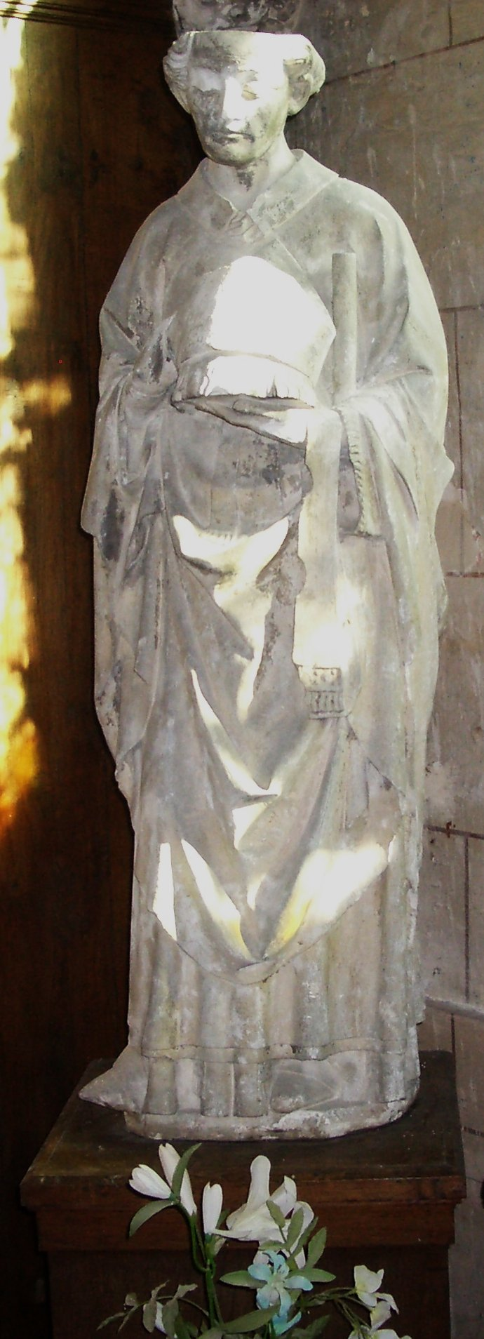 Collégiale d'Écouis - Statuaire - saint Nicaise (Nicasius)